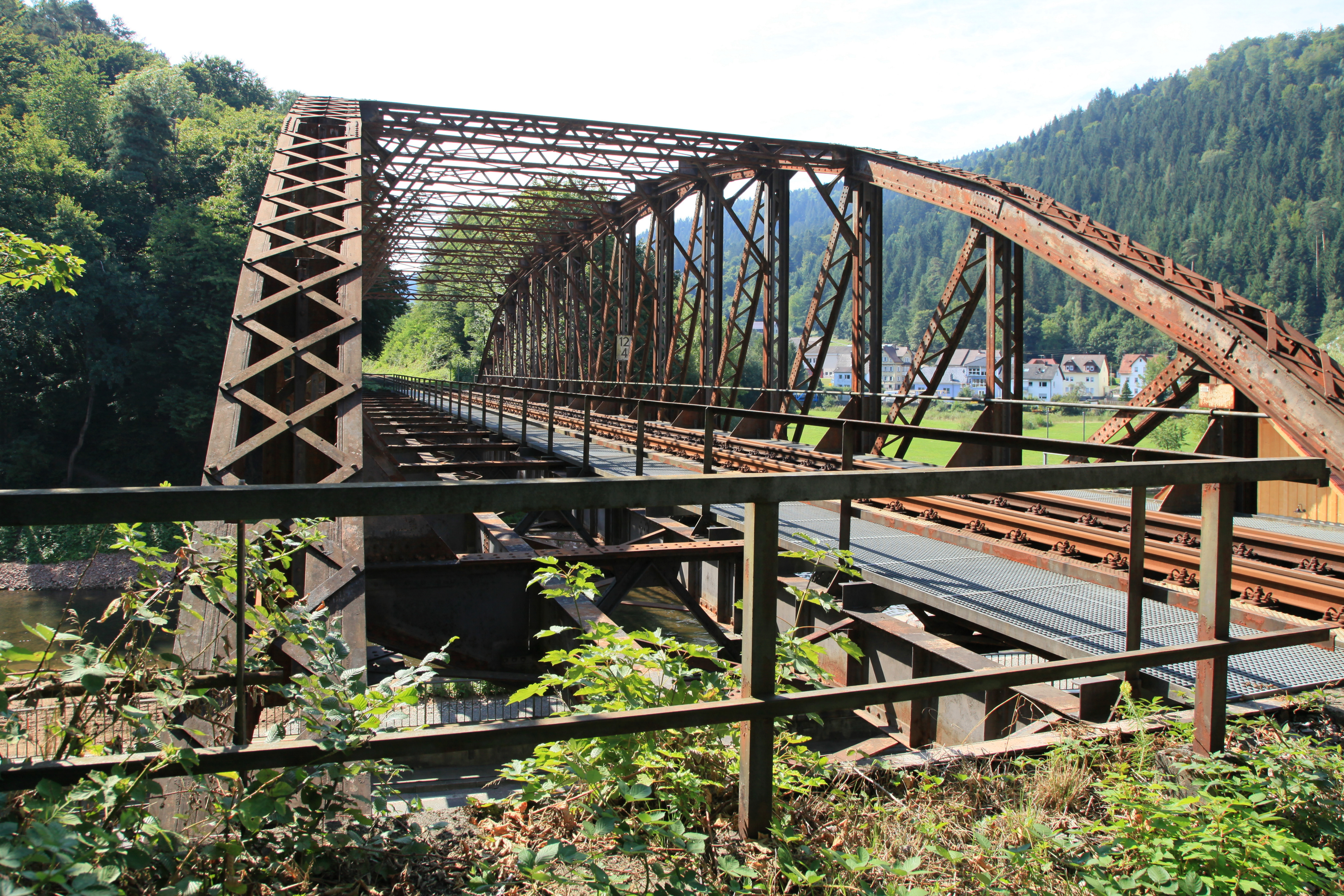 Bahnbrücke über Pforzheimer Straße und Nagold in Unterreichenbach